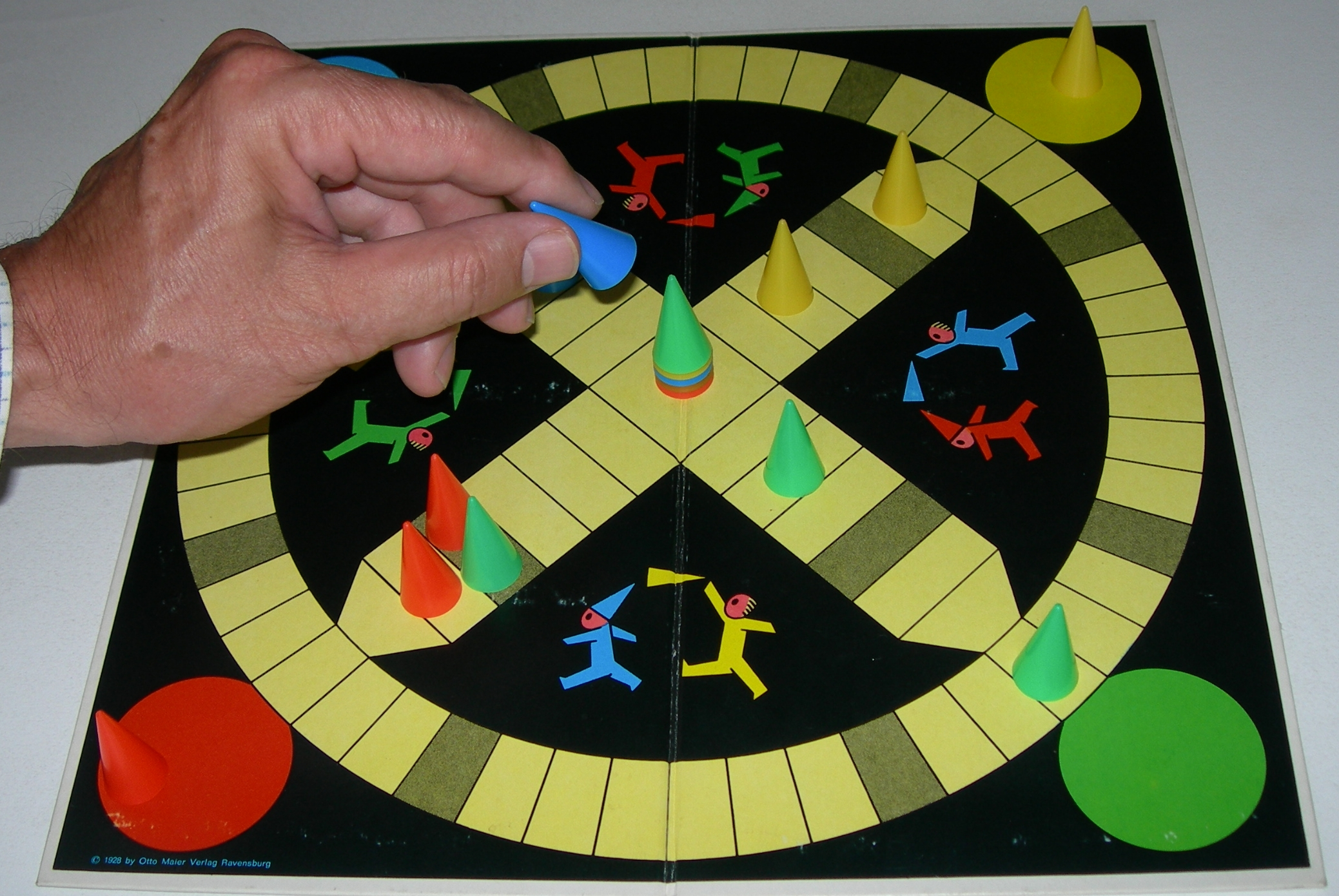 Fang den Hut, board game (Ravensburger, 1928), design by Fritz Ehlotzky (1886–?)